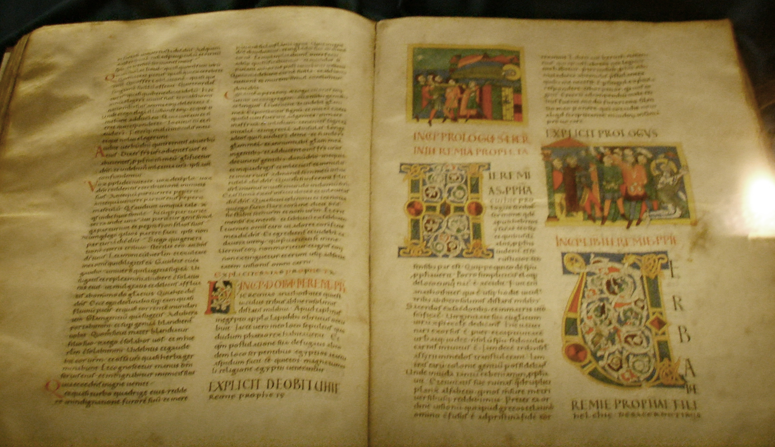 Toscana xii secolo, bibbia di santa maria del fiore